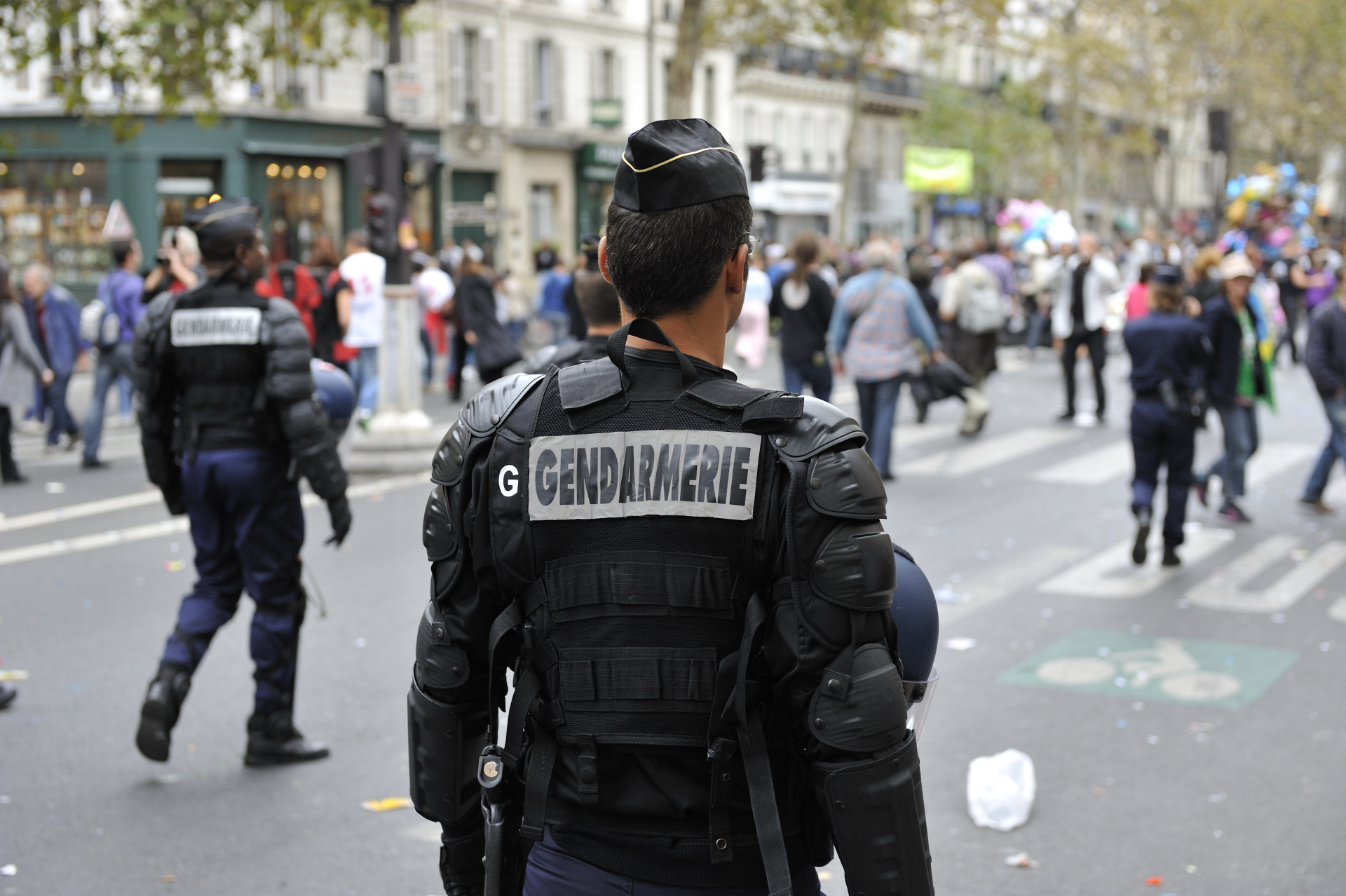 En France, la gendarmerie nationale est une force armée chargée des missions de police et placée sous la tutelle du ministère de l'Intérieur et du ministère de la Défense. Le numéro d'appel d'urgence de la gendarmerie est le 17 ou le 112.